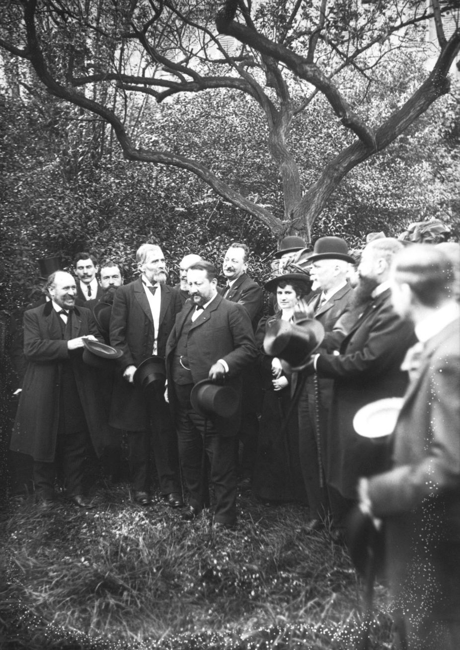 Ouverture du musée Balzac à Passy, le 16 mai 1908: de g. à d. MM. Léon Maillard et Louis Baudier de Royaumont Source: Louis Étienne Baudier de Royaumont, "Pro domo" (la Maison de Balzac) : histoire et description, catalogue du Musée, Paris, E. Figuière, 1914, p91